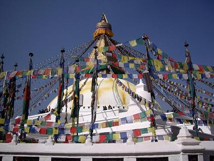 Eigen werk, Bouddah, Kathmandu